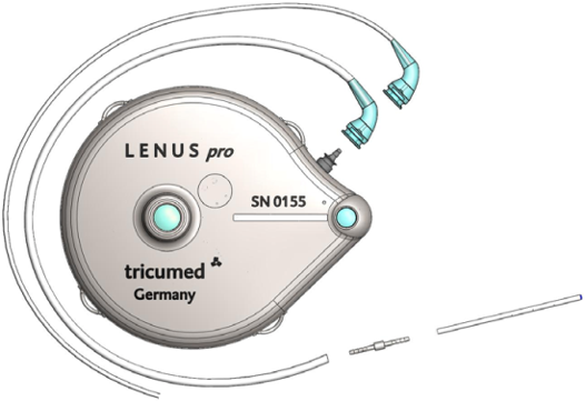 Pompa do ciągłego podawania treprostinilu dożylnie.